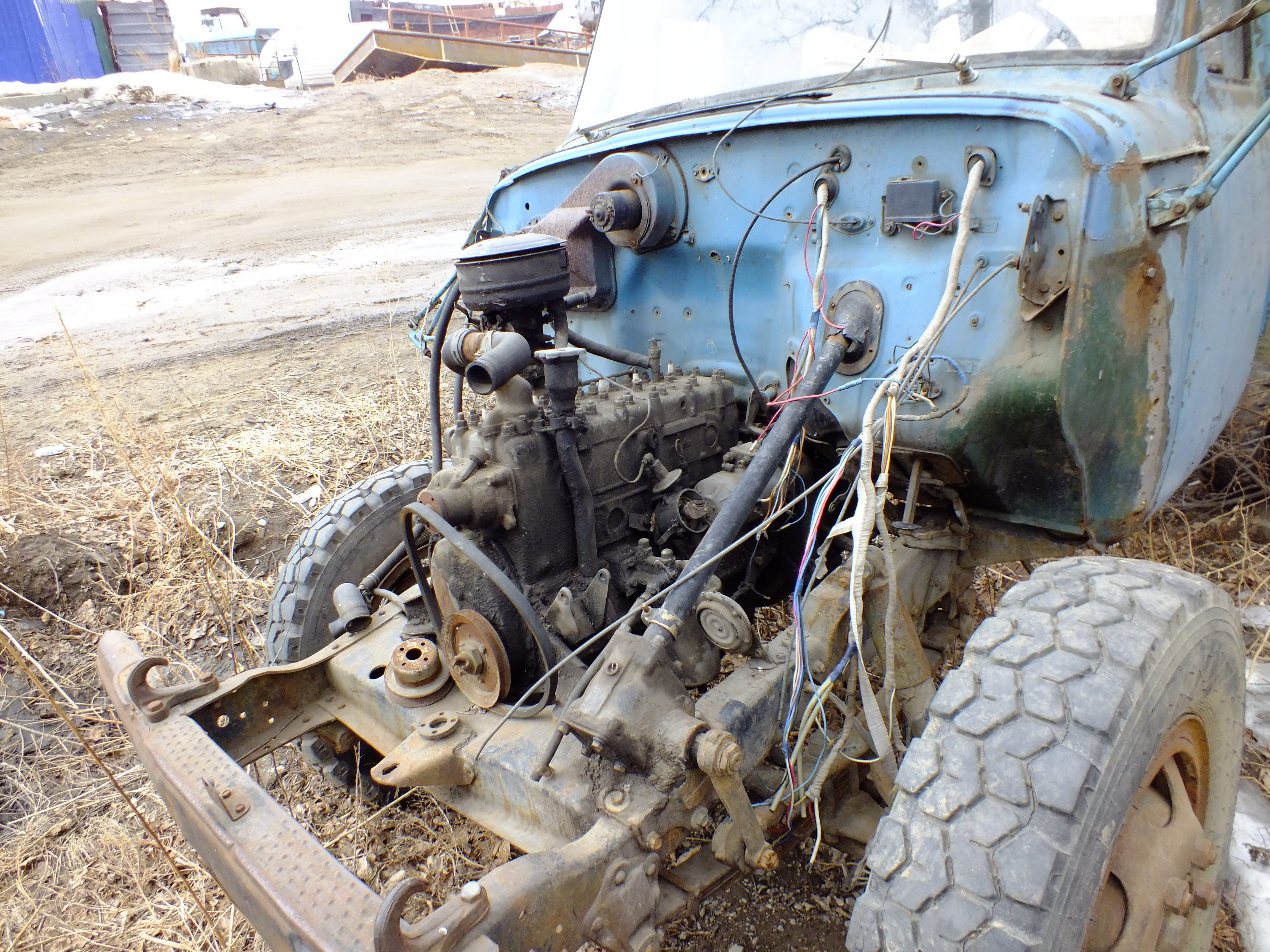 Старый ГАЗ-52